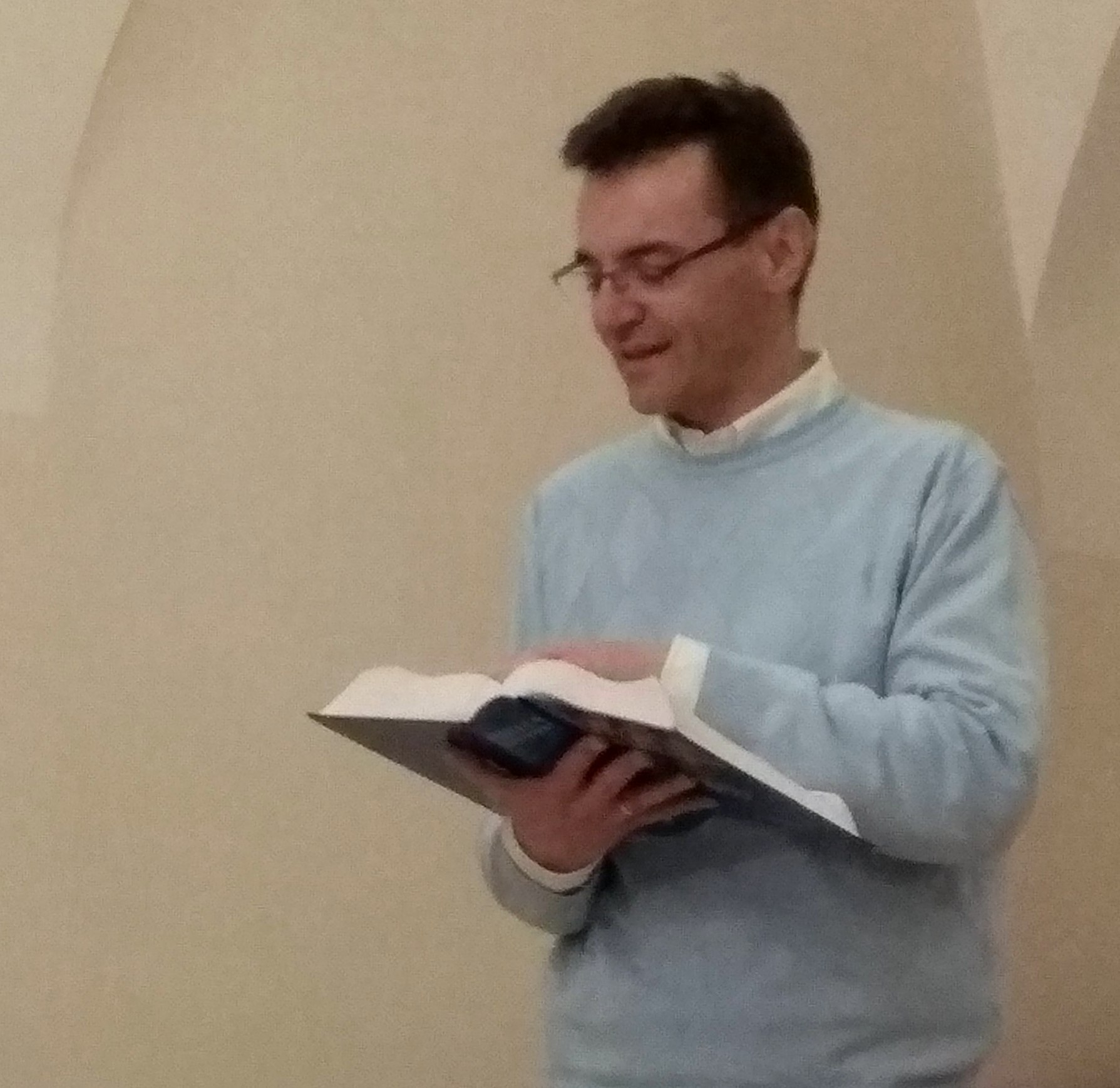 Maciej Münnich – polski historyk, badacz dziejów antycznych